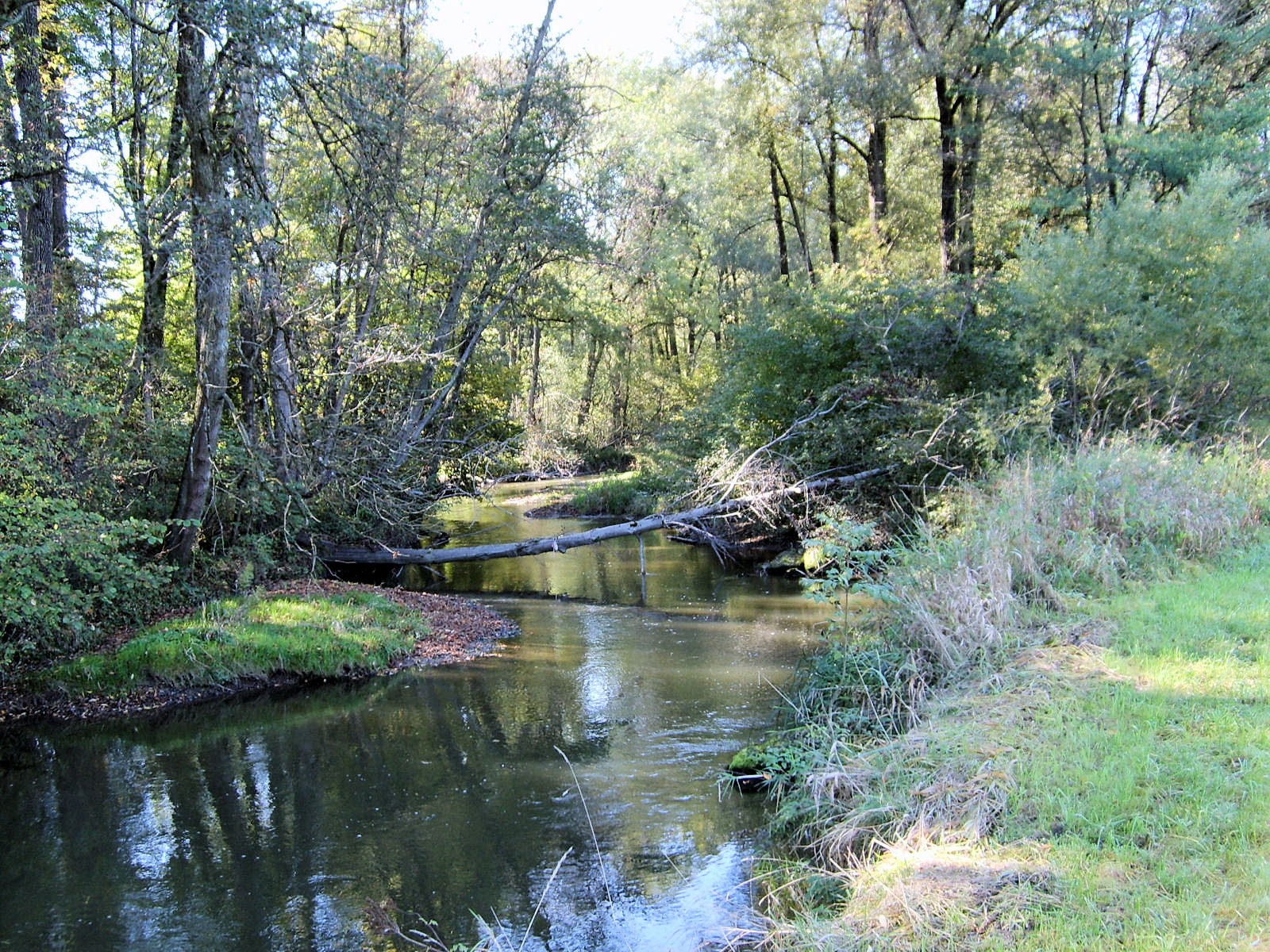 Kaltenauen bei Rosenheim.